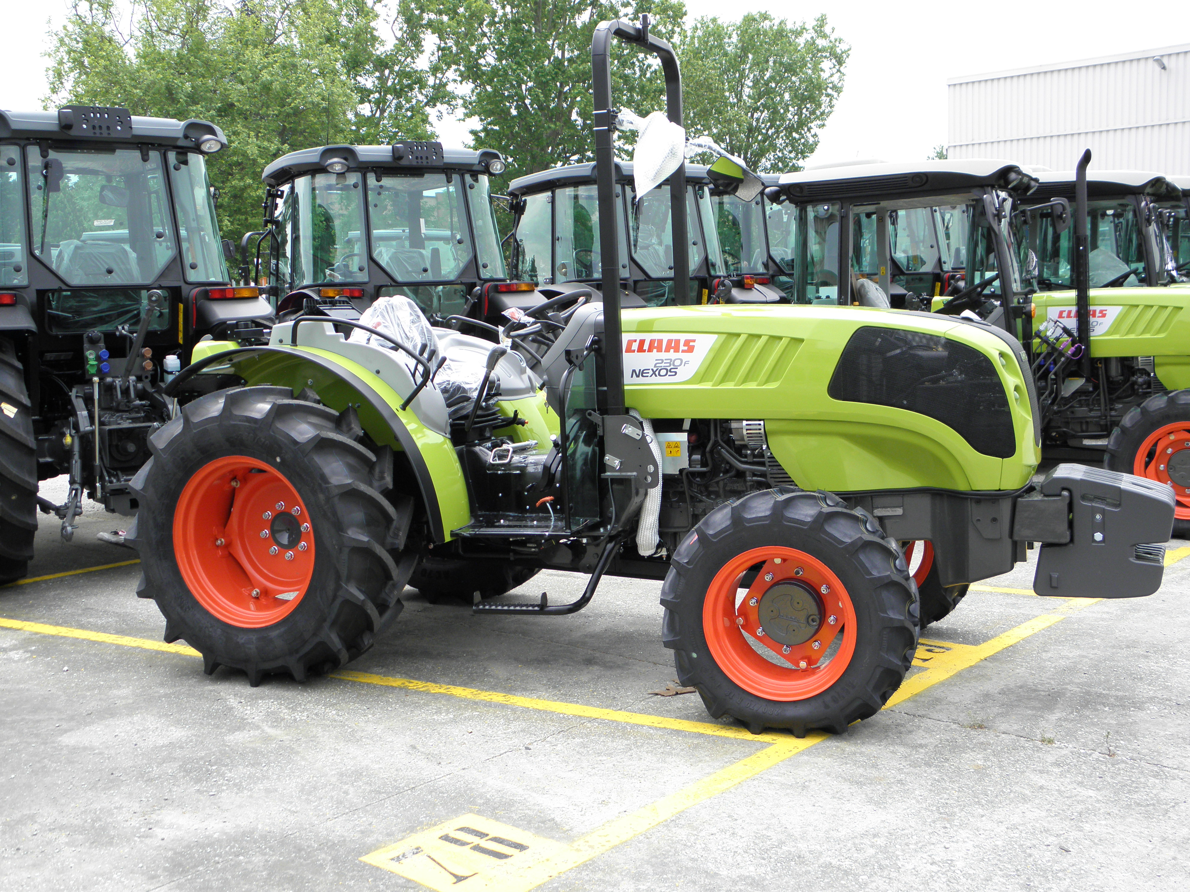 Rovigo, Carraro Agritalia, Claas Nexos 230 F in sosta sul piazzale.